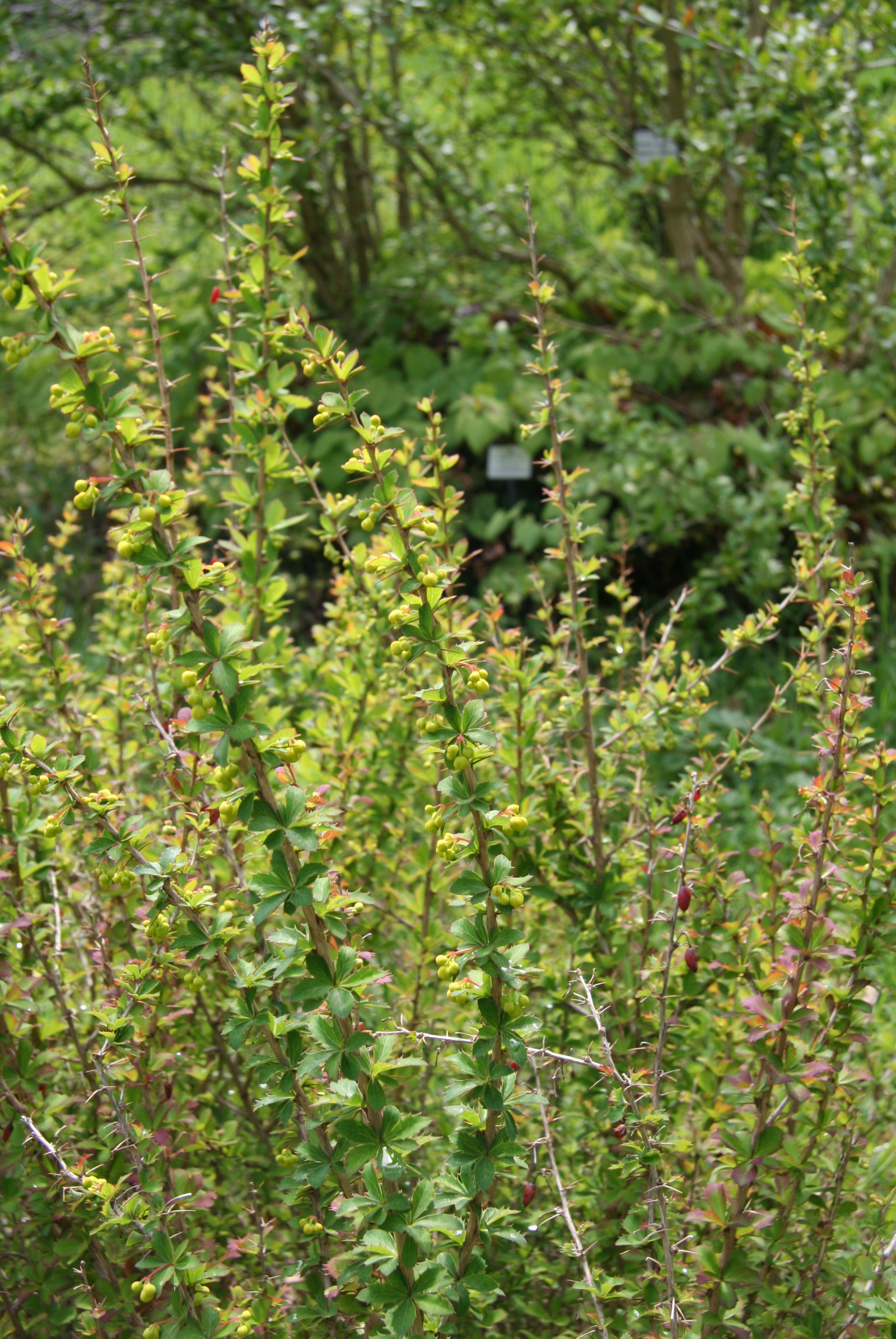 Berberis jaeschkeana im Botanischen Garten Dresden